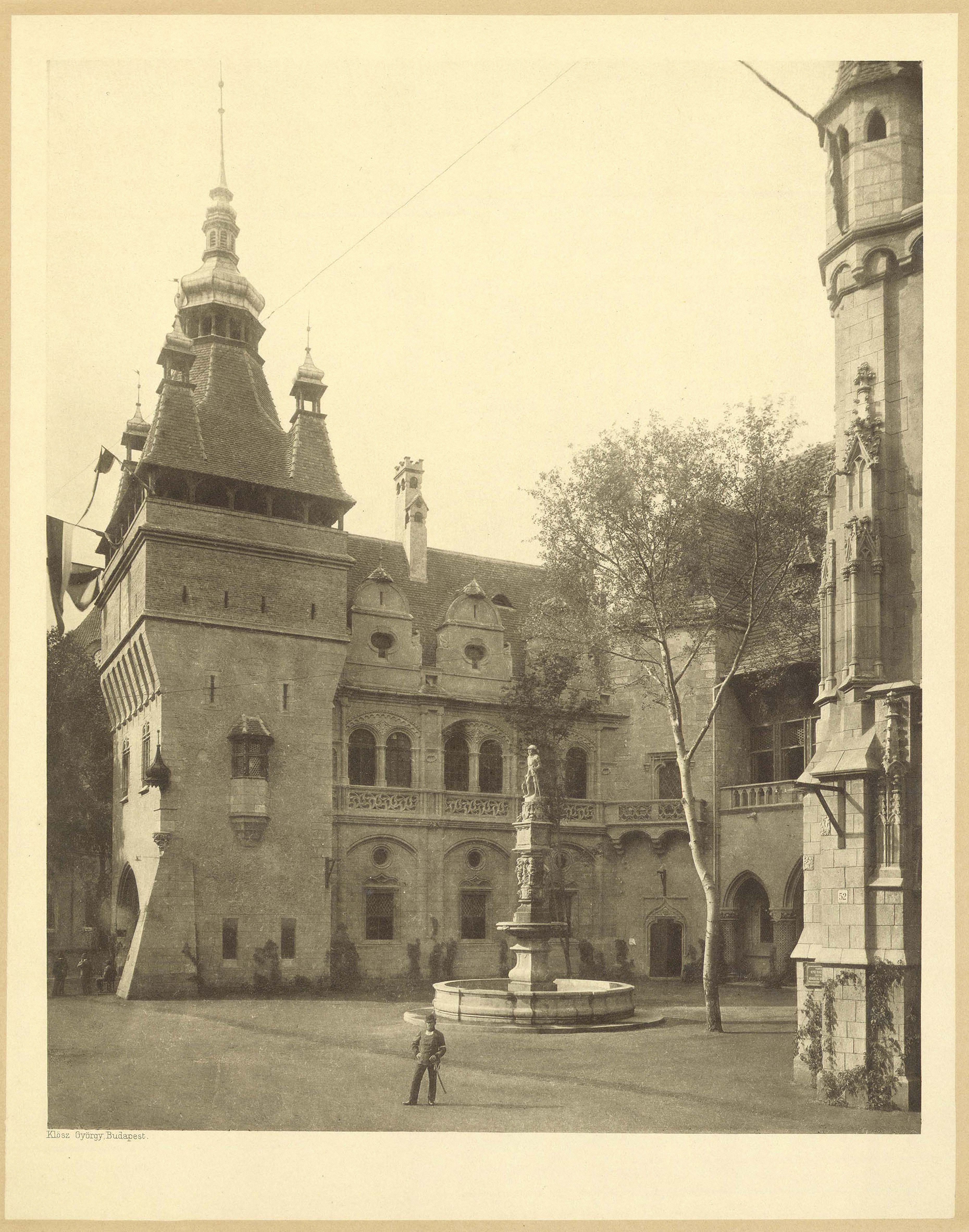 Millenniumi kiállítás: Vajdahunyad vára, a történelmi főcsoport gótikus épületeggyütese. Balra az Apostolok tornya és a Hunyadi-loggia, előtérben a Pozsonyi kút. A felvétel 1896-ban készült. A kép forrását kérjük így adja meg: Fortepan / Budapest Főváros Levéltára. Levéltári jelzet: HU.BFL.XV.19.d.1.01.009 Location: Hungary, Budapest XIV. Tags: Budapest